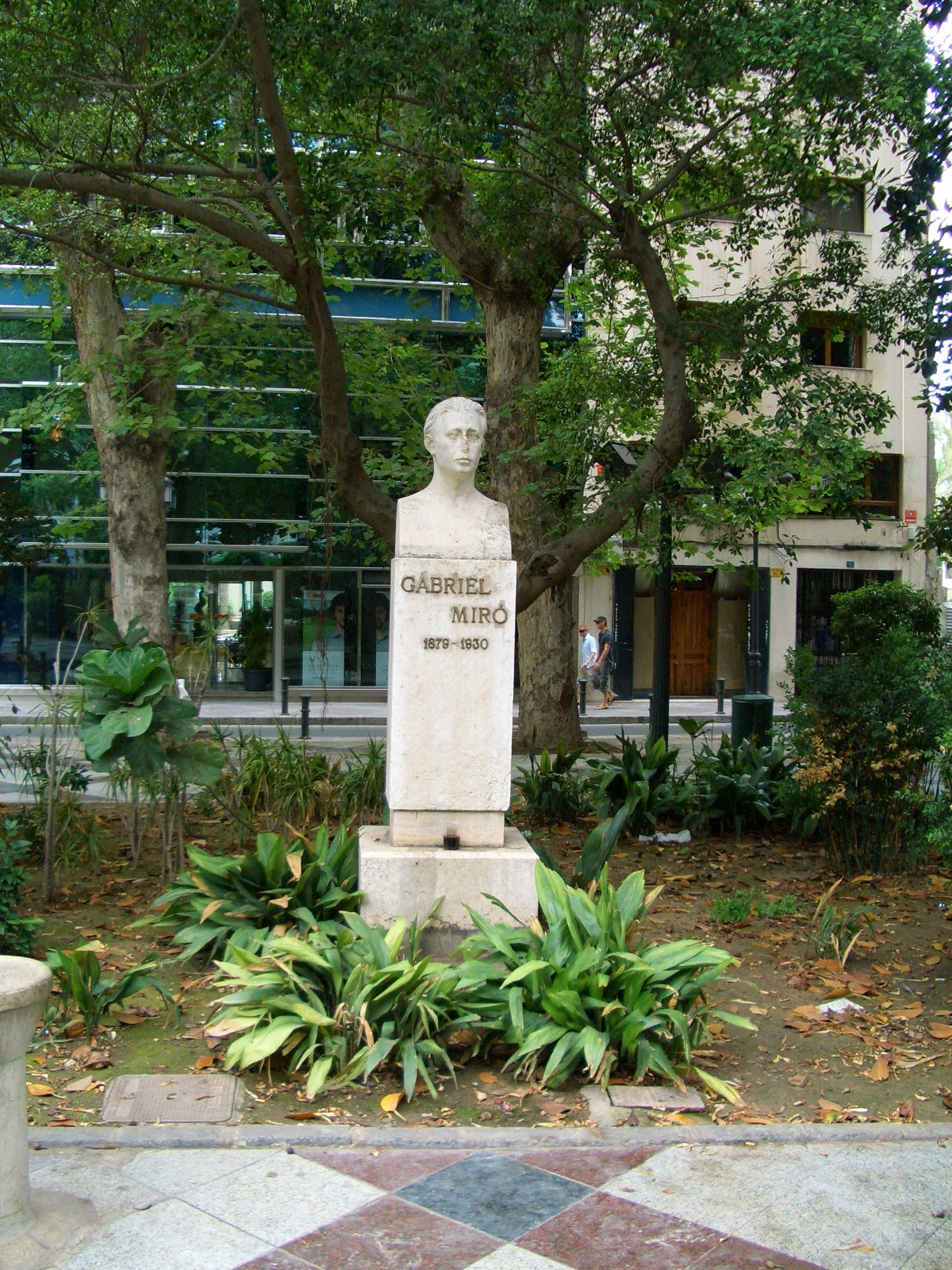 Denkmal des spanischen Schriftstellers Gabriel Miró (1879 - 1930) in Alicante, Spanien